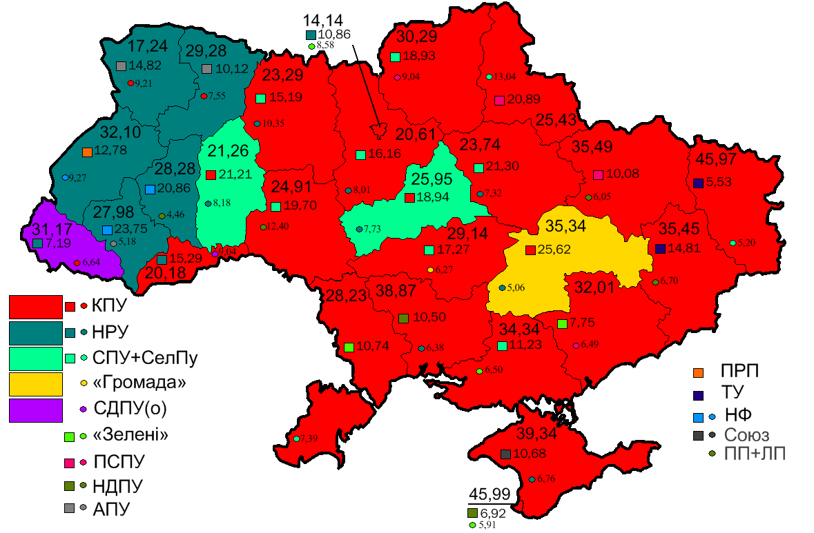 Результати виборів до ВР України 1998 року.